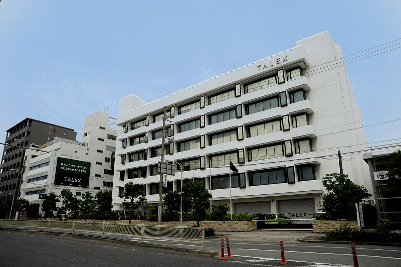 TALEX今川事業所